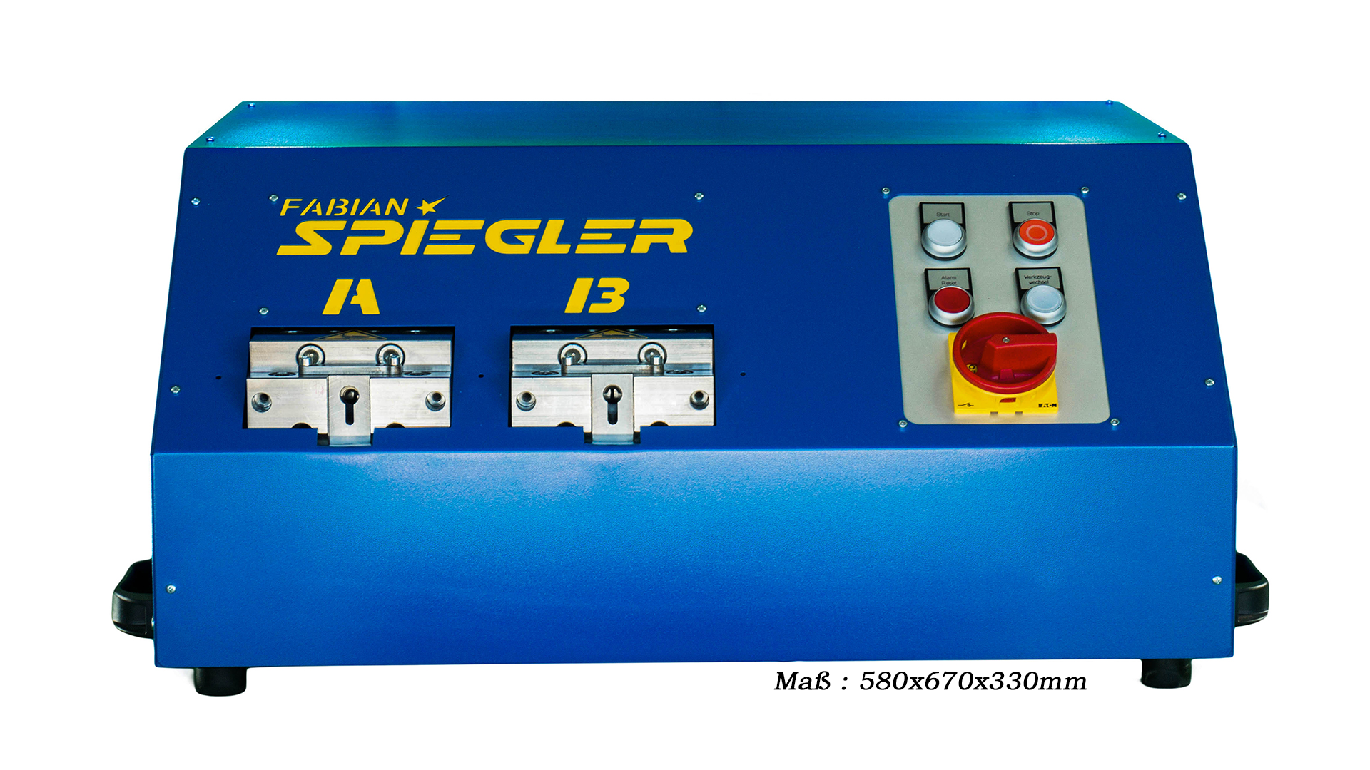 Weltweit wohl die Einzige hydraulische Bördelmaschine zm bördeln von Rohren -Anbringen von 1500 Bördel pro Arbeitstag möglich -Schnelle Umrüstung der Wekzeuge für verschiedene Rohrdurchmesser -Größe= 580x670x330mm